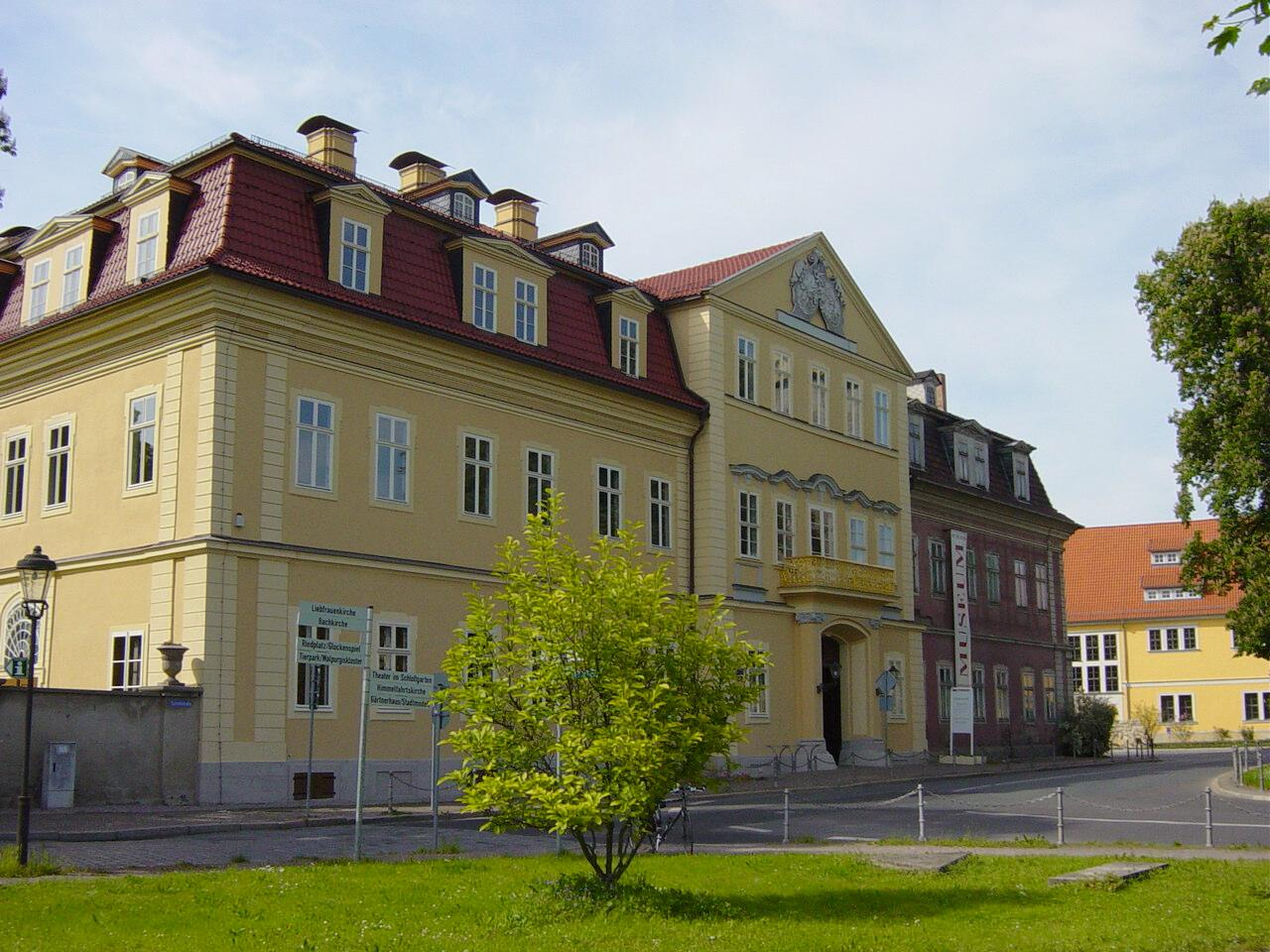 Arnstadt, Schlossmuseum mit Puppensammlung "Mon Plaisir"